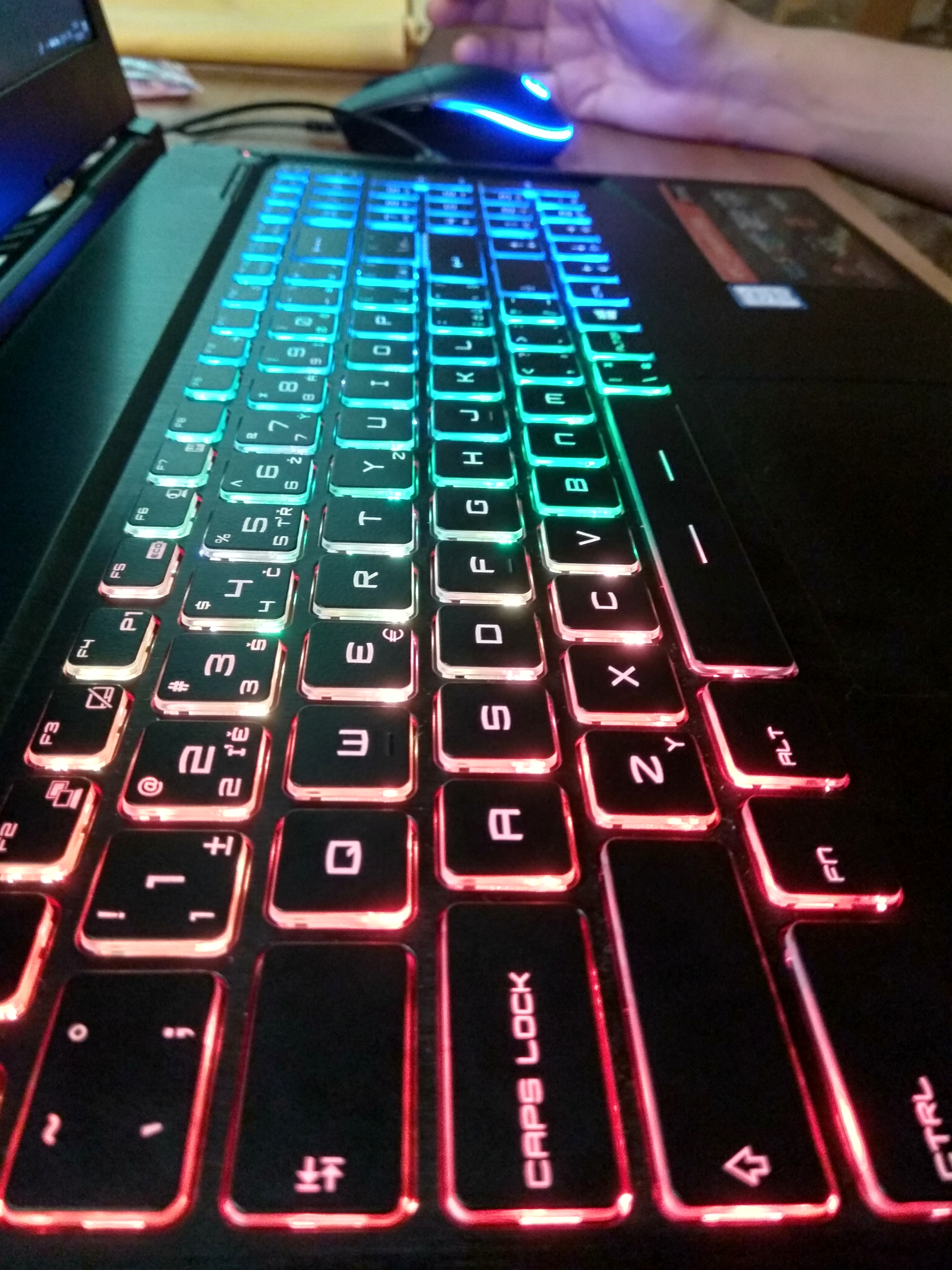 Účastníci wikisrazu v brněnské restuaraci Baroko 17. dubna 2019. Detail počítačového vybavení jednoho z účastníků.